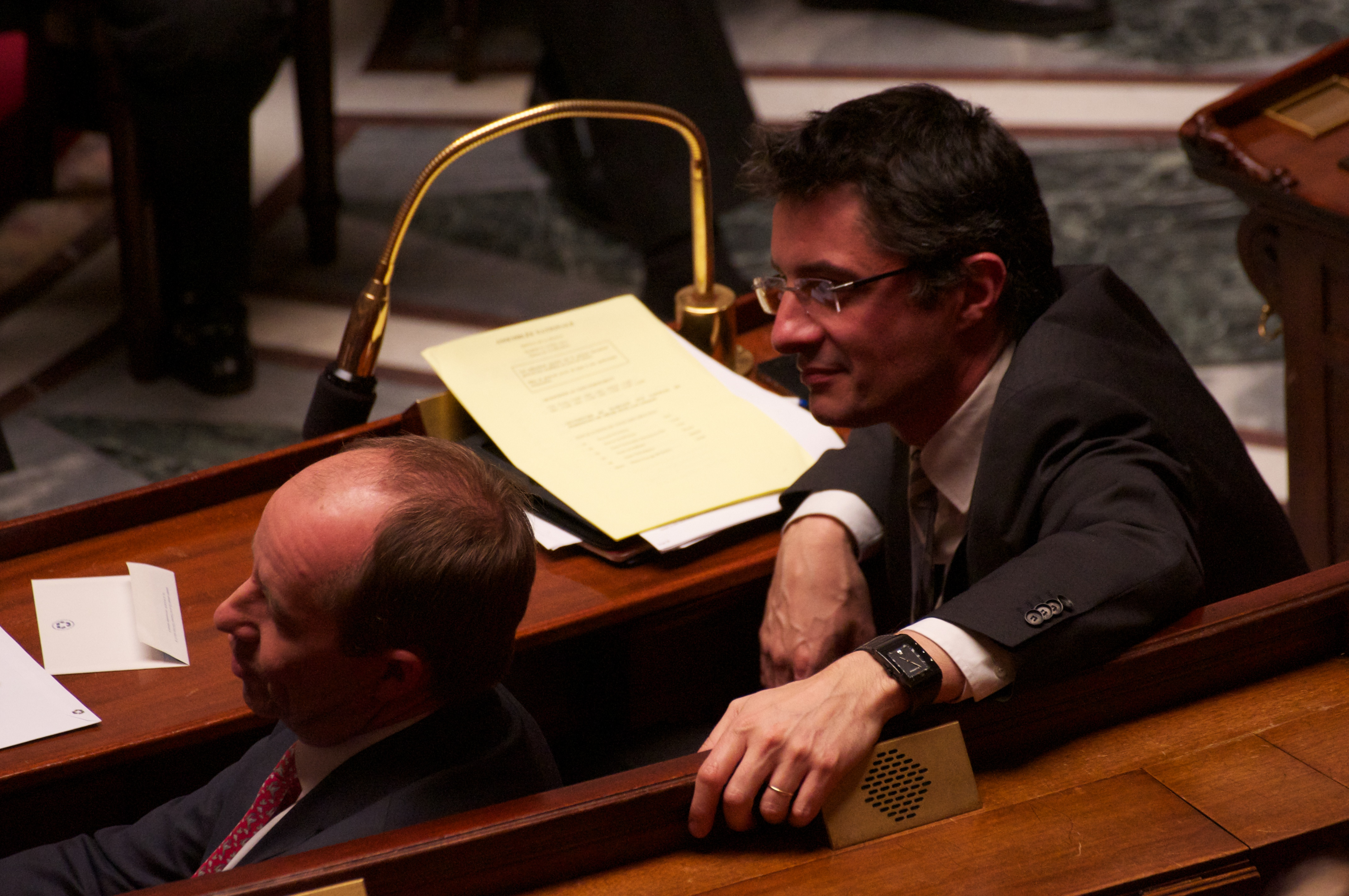 Vote solennel de la loi ouvrant le mariage aux couples de personnes de même sexe - Assemblée nationale